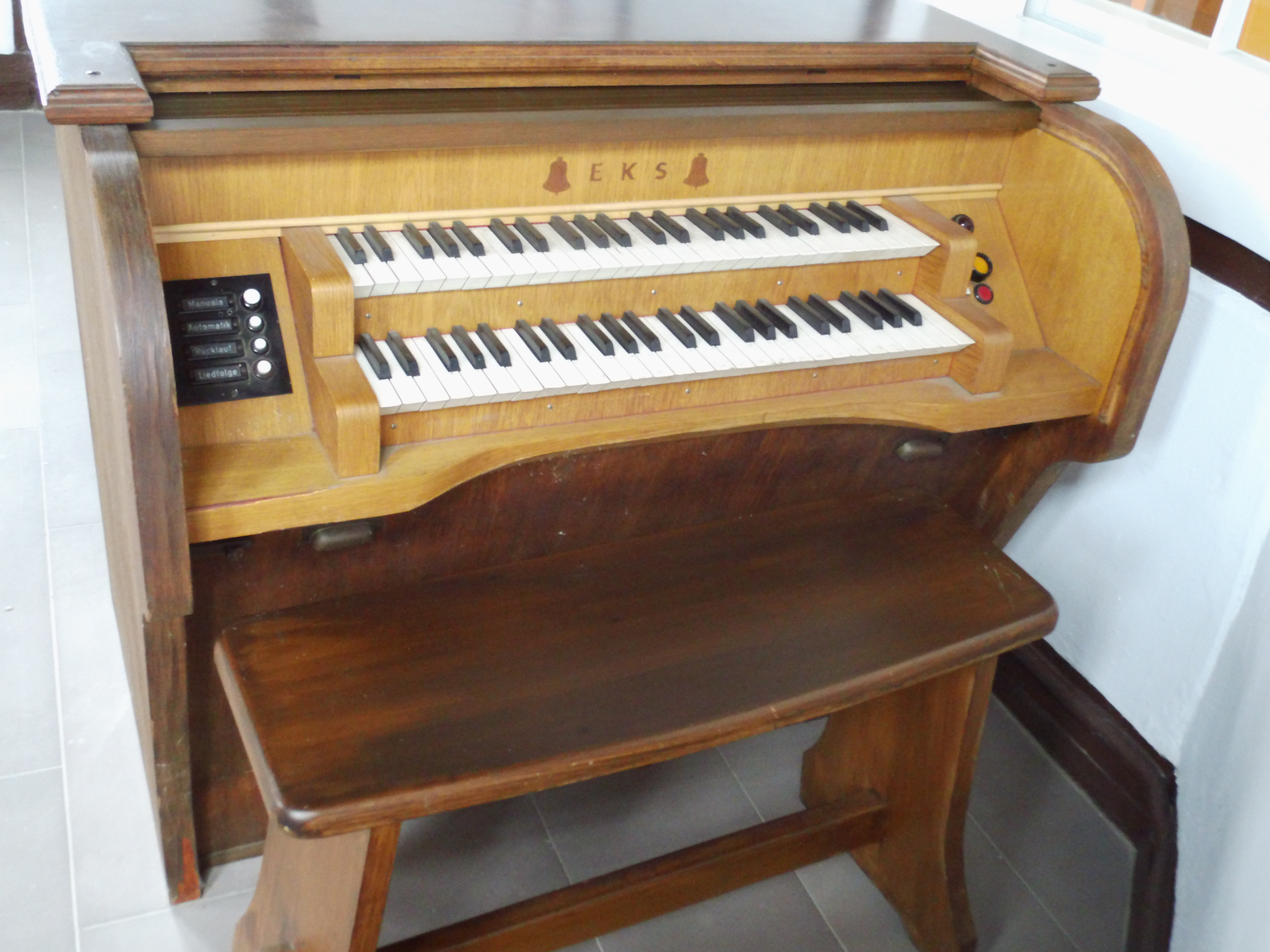 Spieltisch der Fa. Korthage für Glockenspiel im Turm des histor. Rathauses Höxter